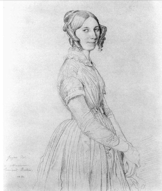 Portrait of Mme Armand Bertin née Cécile Dollfus. Graphite on paper, 34.5 x 26cm